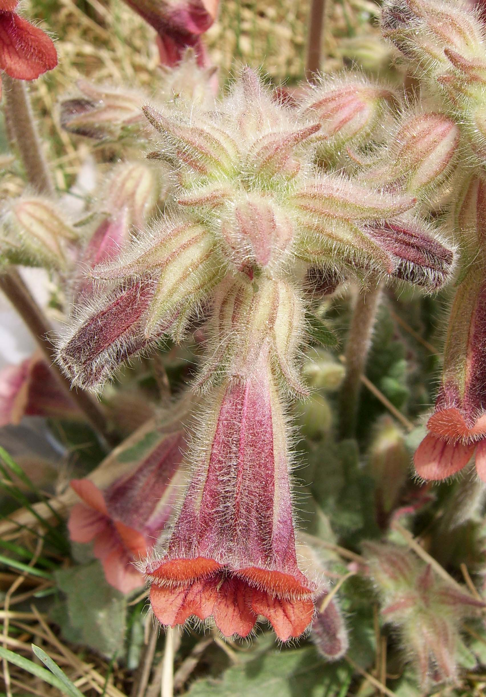 地黄